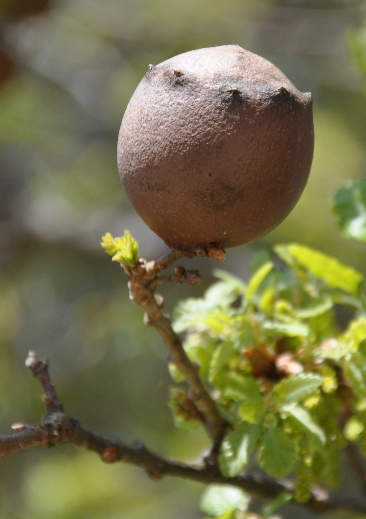 Bugalho de cerquinho (Quercus faginea). Miranda do Douro, Portugal.